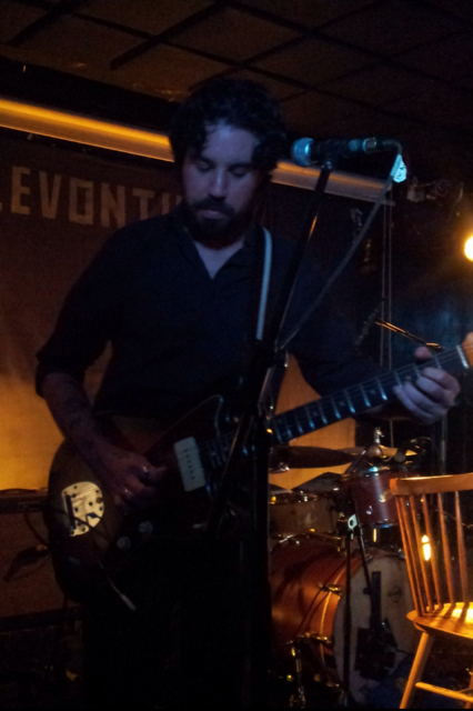 עומר הרשמן